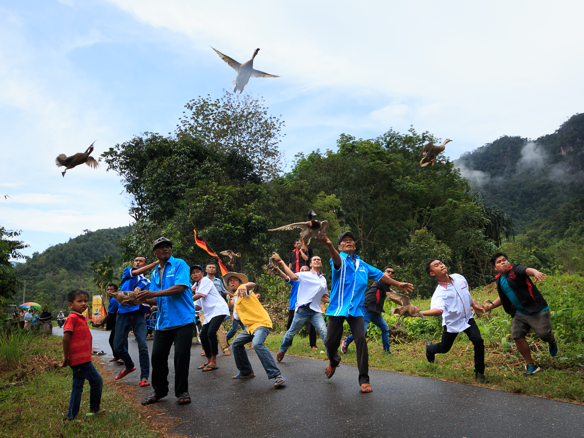 Tradisi Pacu Itiak di Payakumbuh sudah ada sejak tahun 1028. Saat itu para petani di Aur Kuning, Payakumbuh, Kanagarian dan Sicincin menghalau itik yang memakan tanaman padinya. Itik-itik yang dihalau akan terbang ke dataran sawah yang lebih rendah di bawahnya. Itik-itik terbang ini menjadi hiburan tersendiri bagi para petani, lalu diadakan lomba itik terbang.